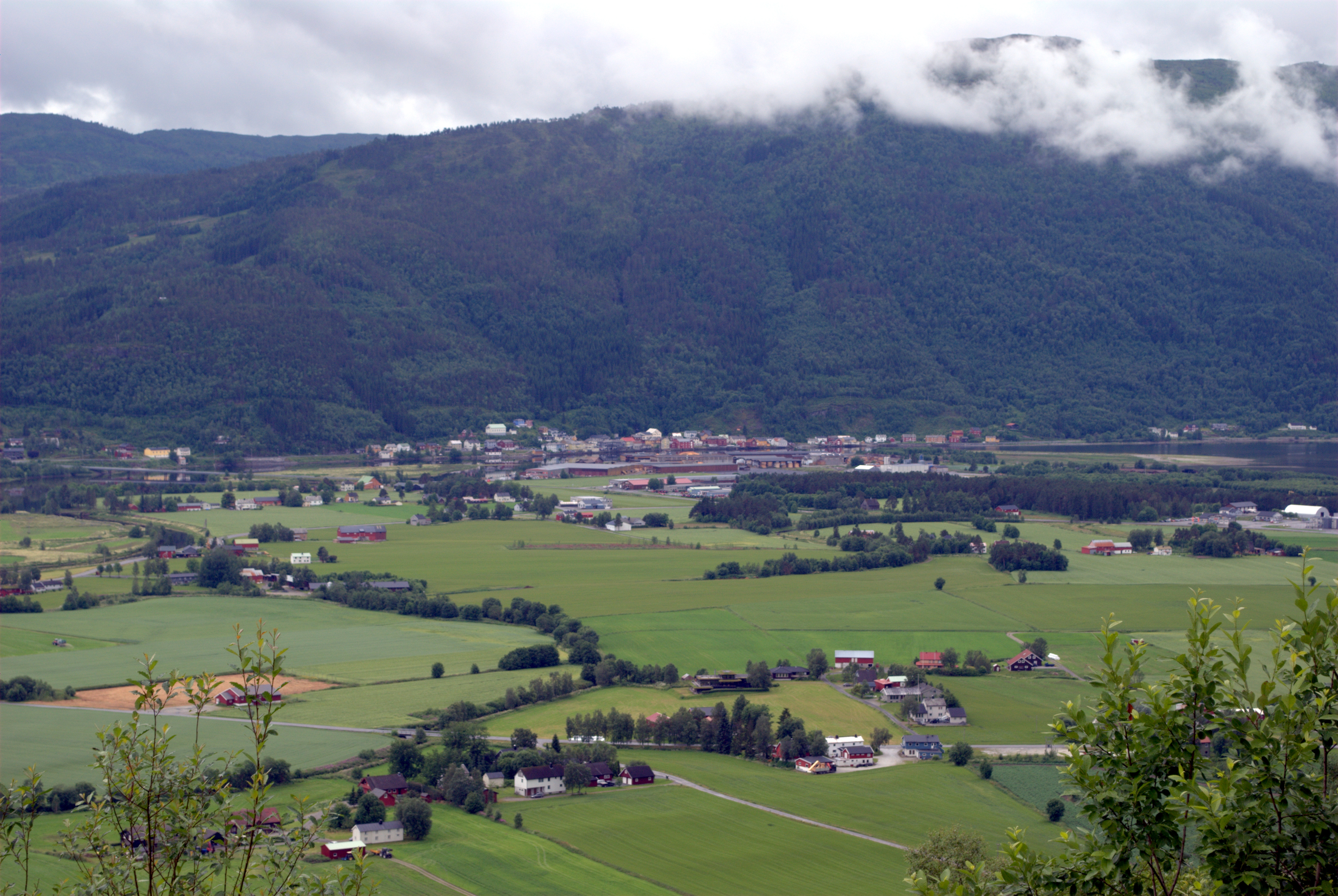 Surnadalsøra i Surnadal, Møre og Romsdal.